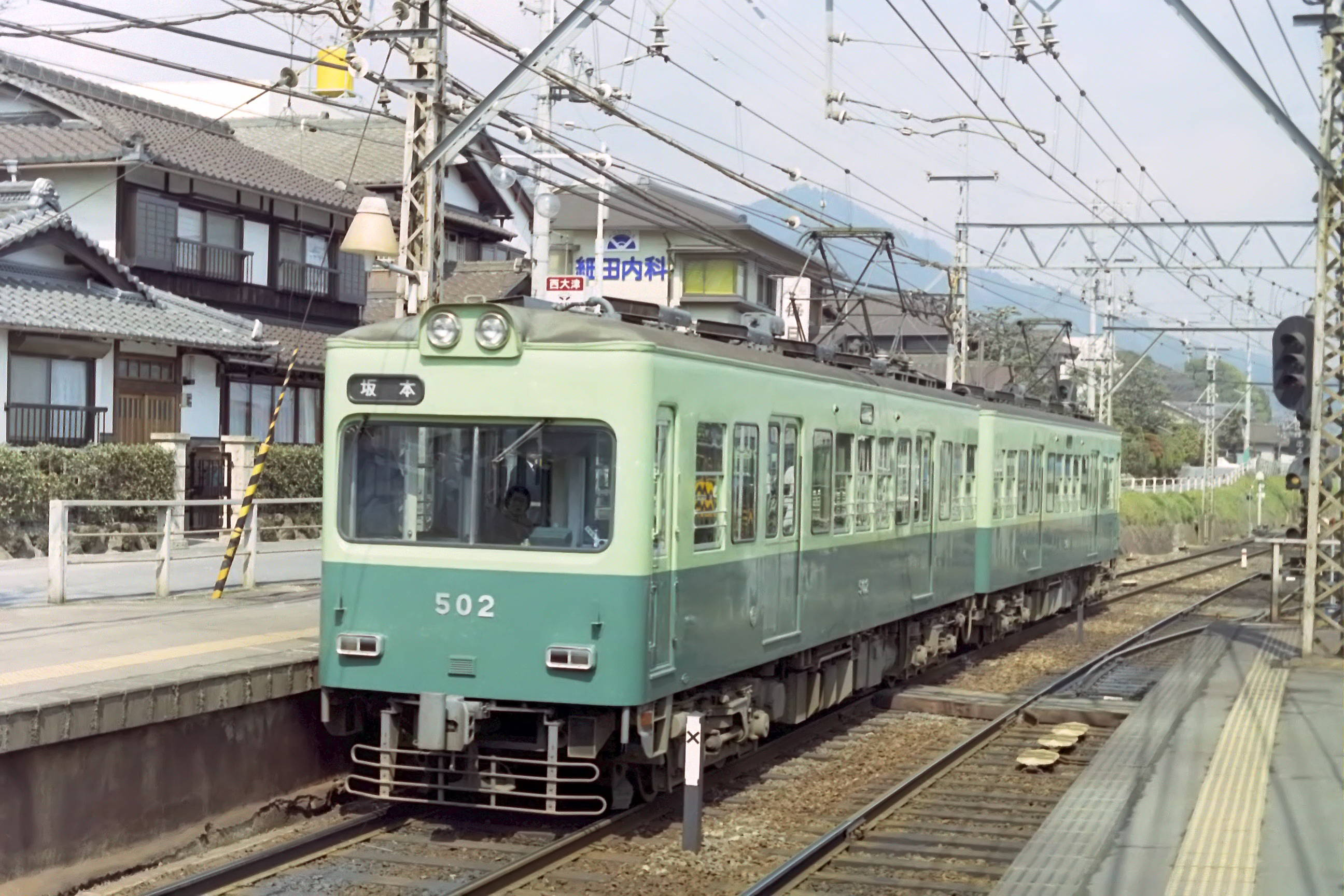 京阪５００形